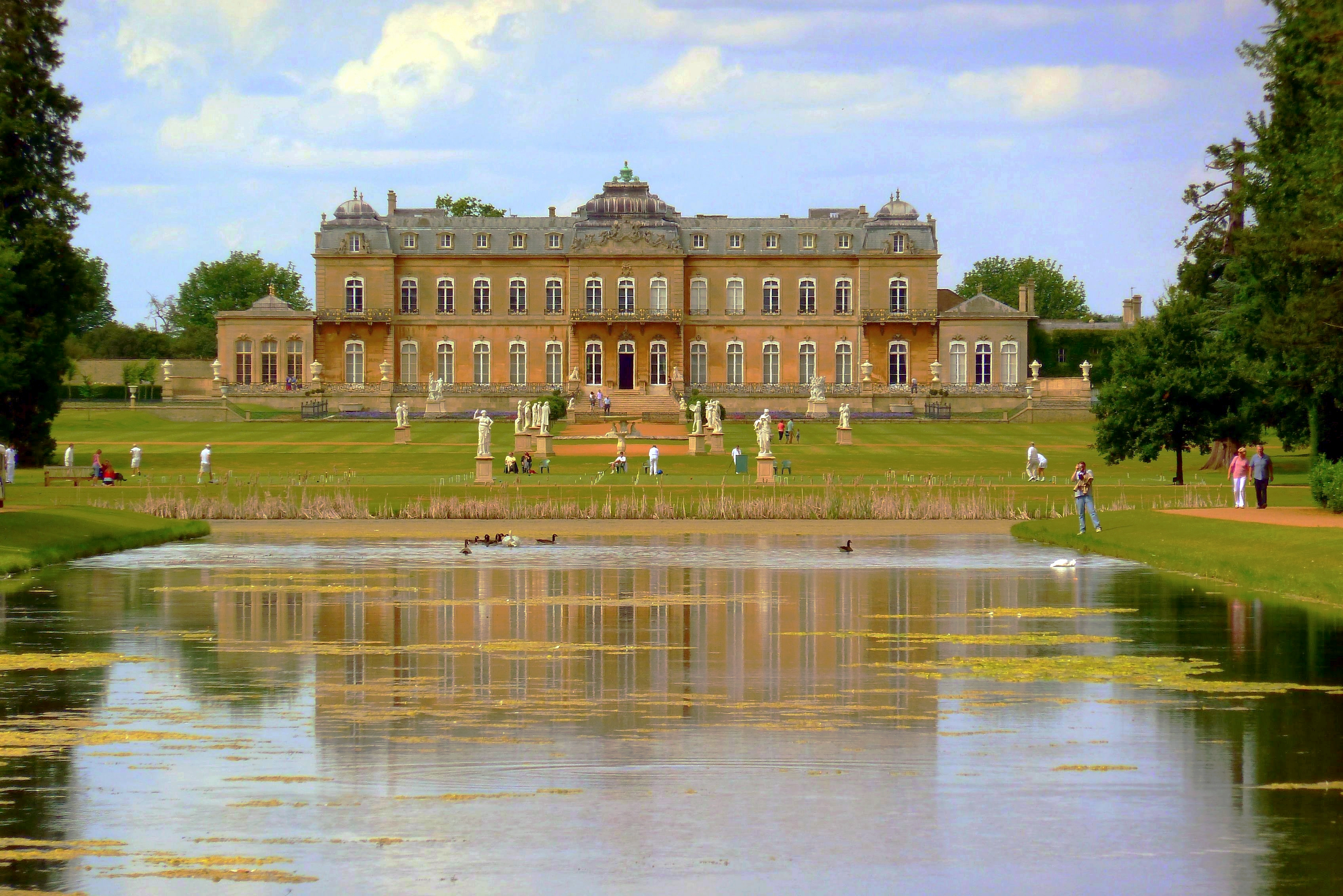 Wrest Park